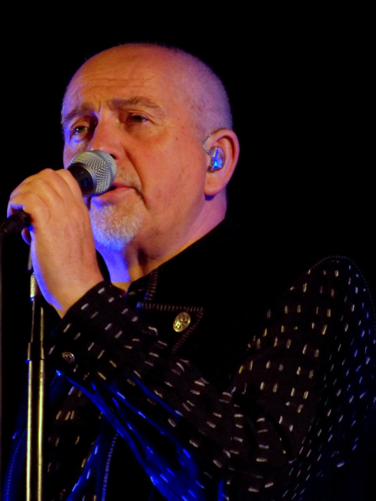 Zdjęcia zrobione podczas III Life Festival w Oświęcimiu.